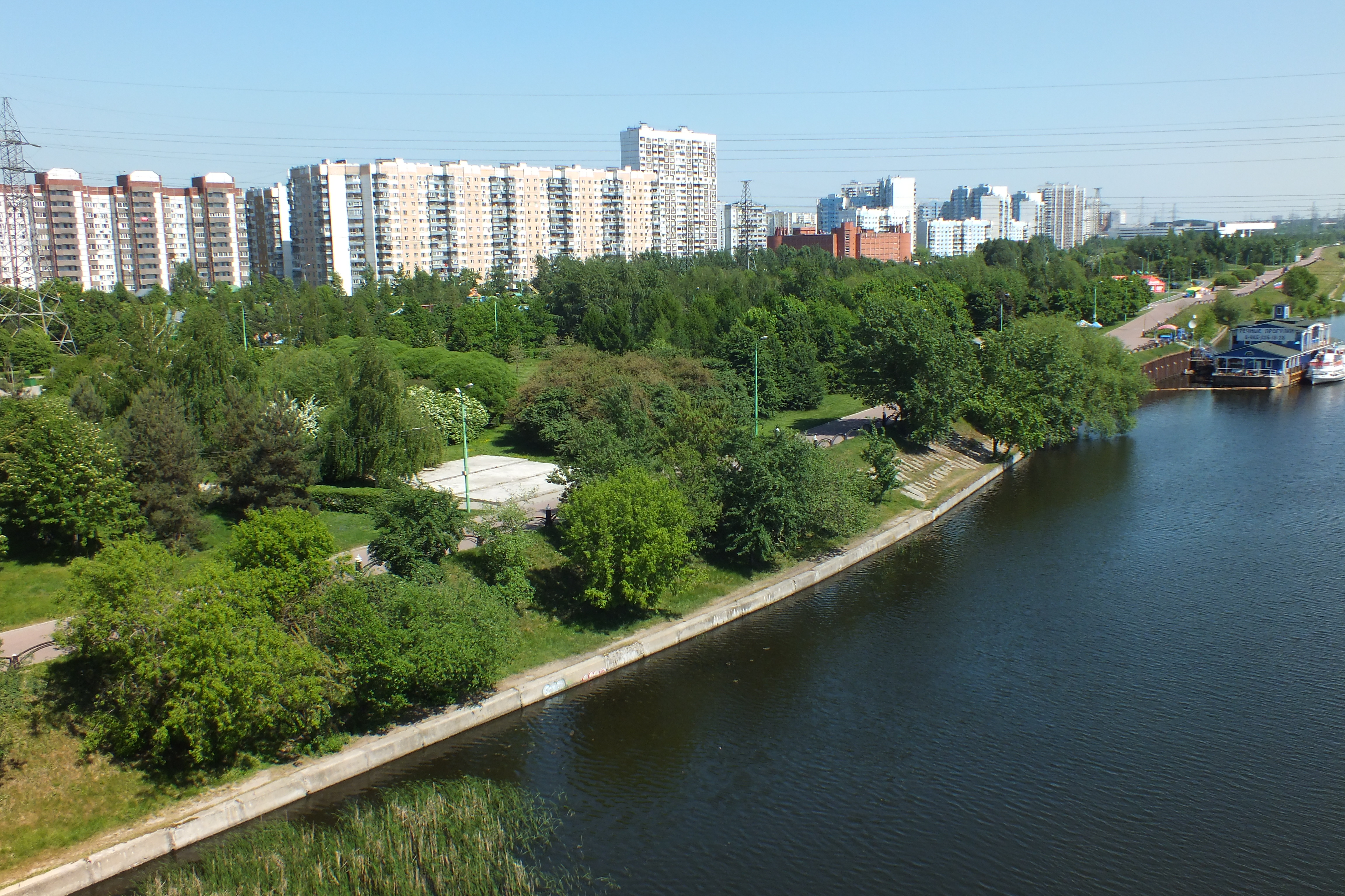 Парк 850-летия Москвы, восточная часть парка, 20 мая 2014 года